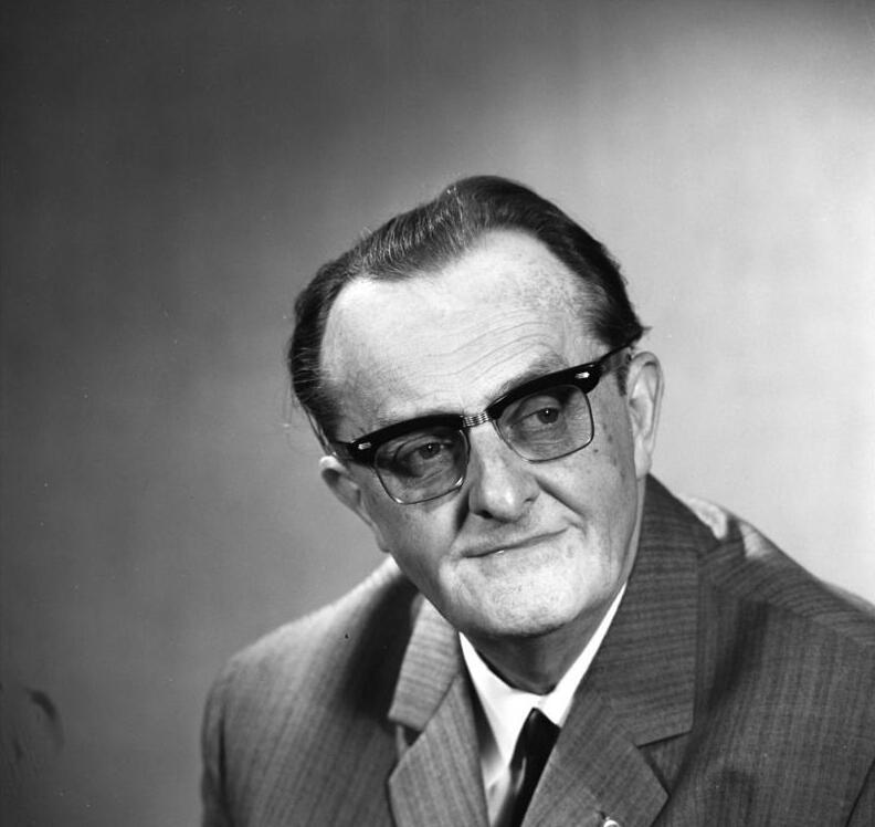 Zentralbild-Hesse 18.9.1968 Prof. Max Burghardt, Präsident des Deutschen Kulturbundes und Mitglied des ZK der SED.